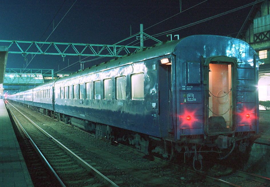 オハネフ12 2033 上り急行きたぐに 大阪行